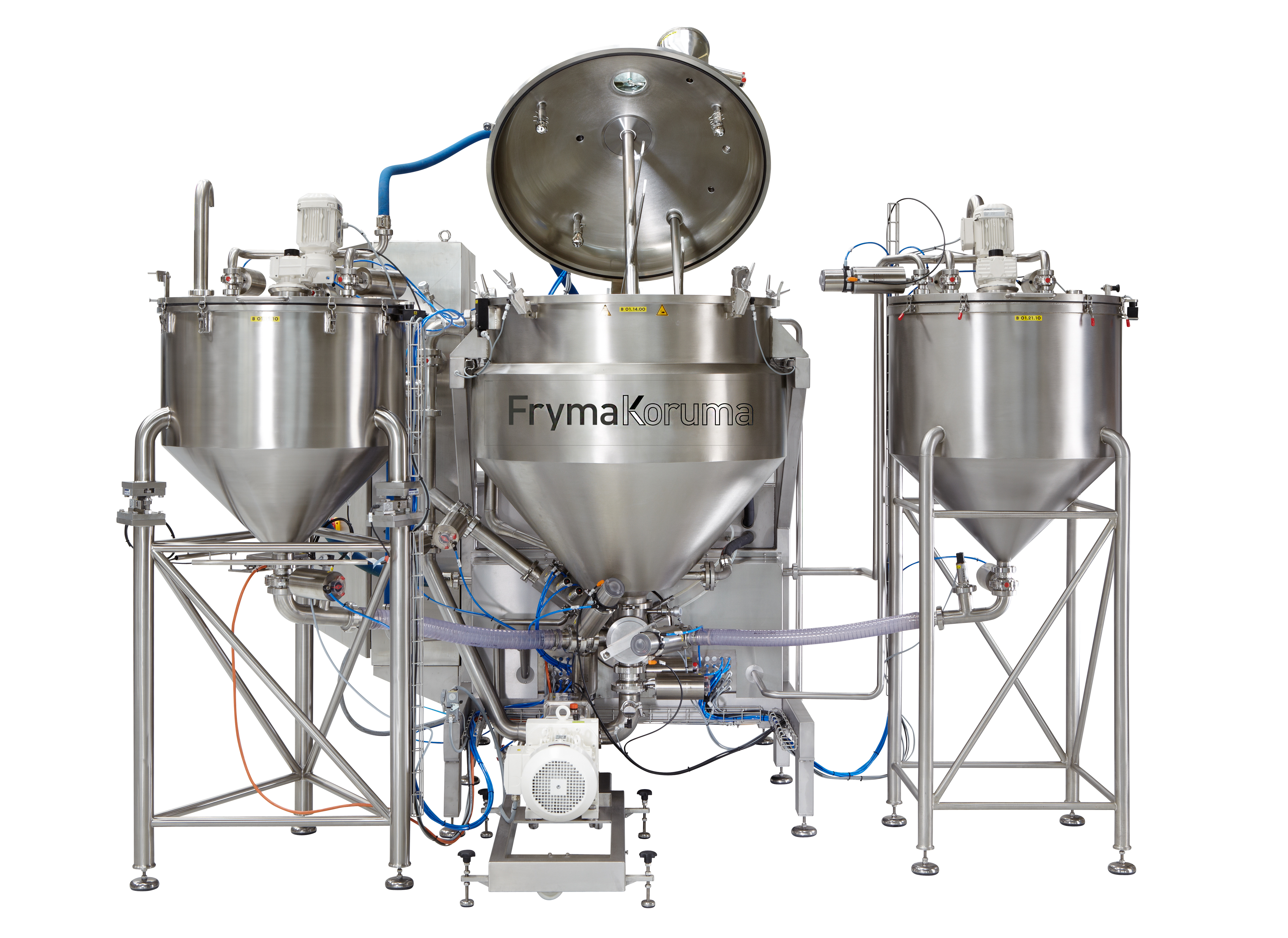 Vakuumprozessanlage mit zwei Beistellbehältern